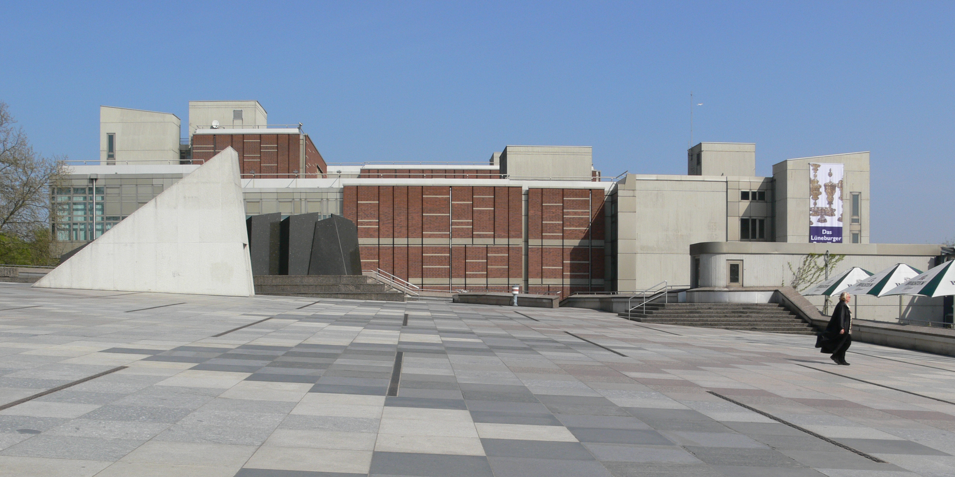 Berlin, Kulturforum, Blick zum Kunstgewerbemuseum